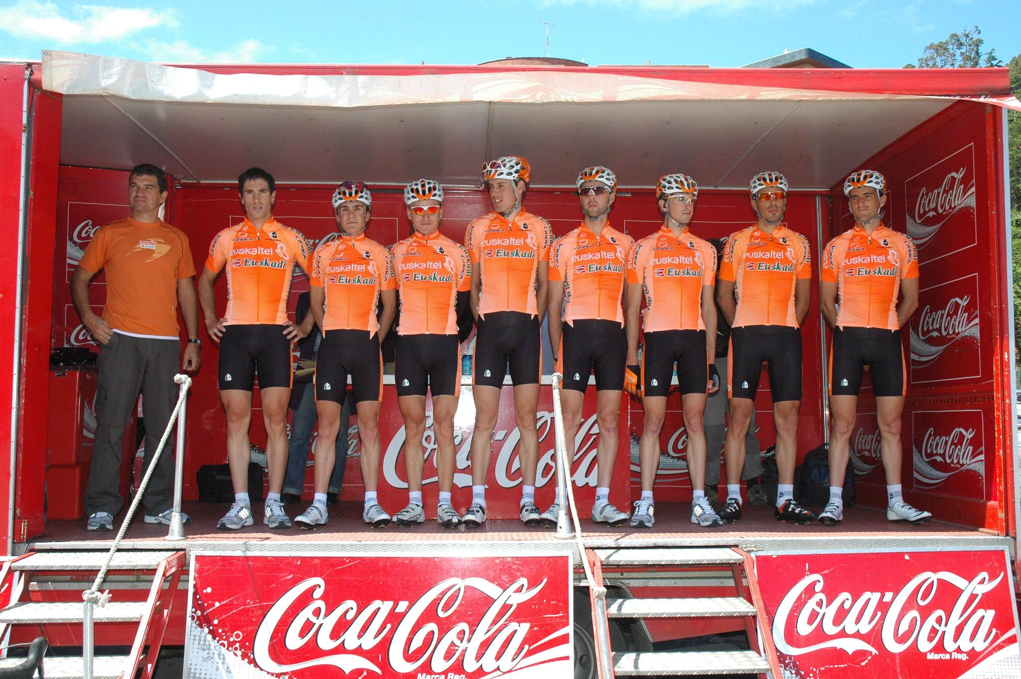 Euskatel - Euskadi, Euskal Bizikleta 2008